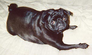 Black Pug dog, fully grown